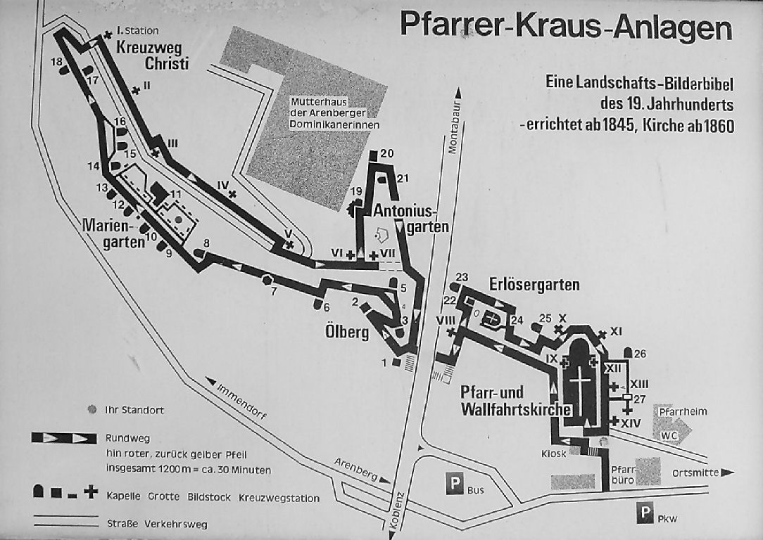 Pfarrer-Kraus-Anlagen in Koblenz-Arenberg